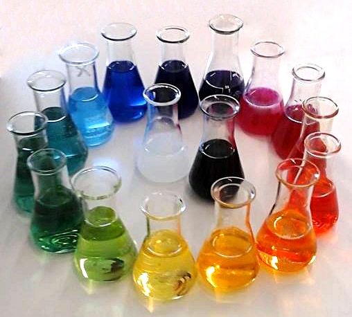 Solutions de pH différents (de 0 à 14) mises en présence d'un indicateur coloré. Le bleu correspond ici aux solutions basiques alors que le rouge indique la présence d'un acide.